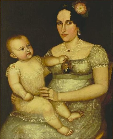 Se dice que la mujer en la pintura es Magdalena Ortega de Nariño.